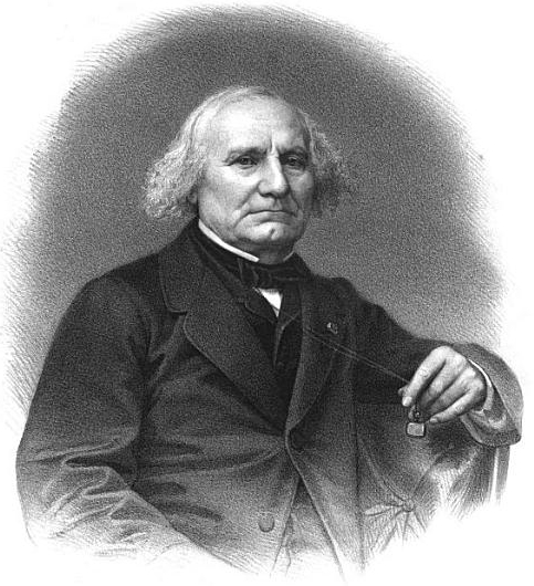 Joseph Naudet est un érudit et historien français, connu surtout pour ses travaux sur l'Empire romain et la littérature latine.